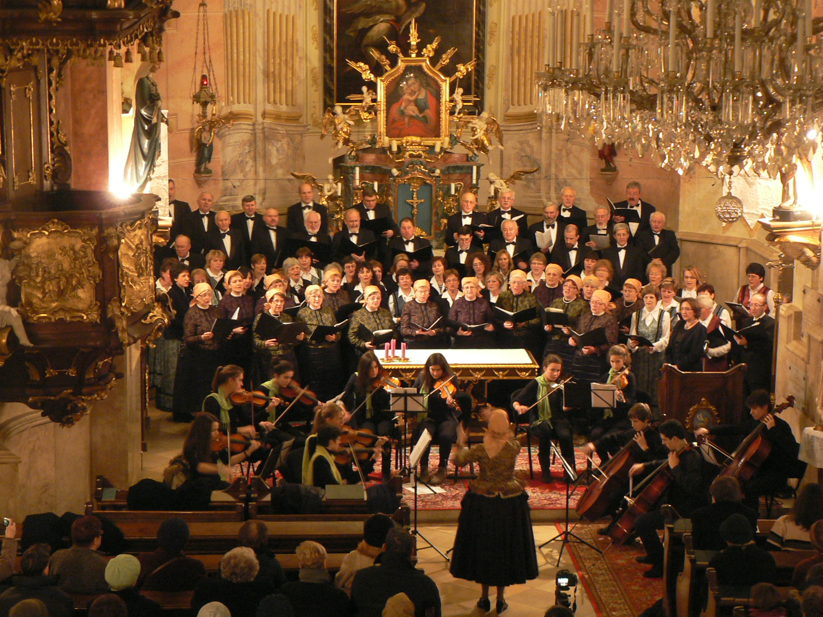 Solymár adventi koncert